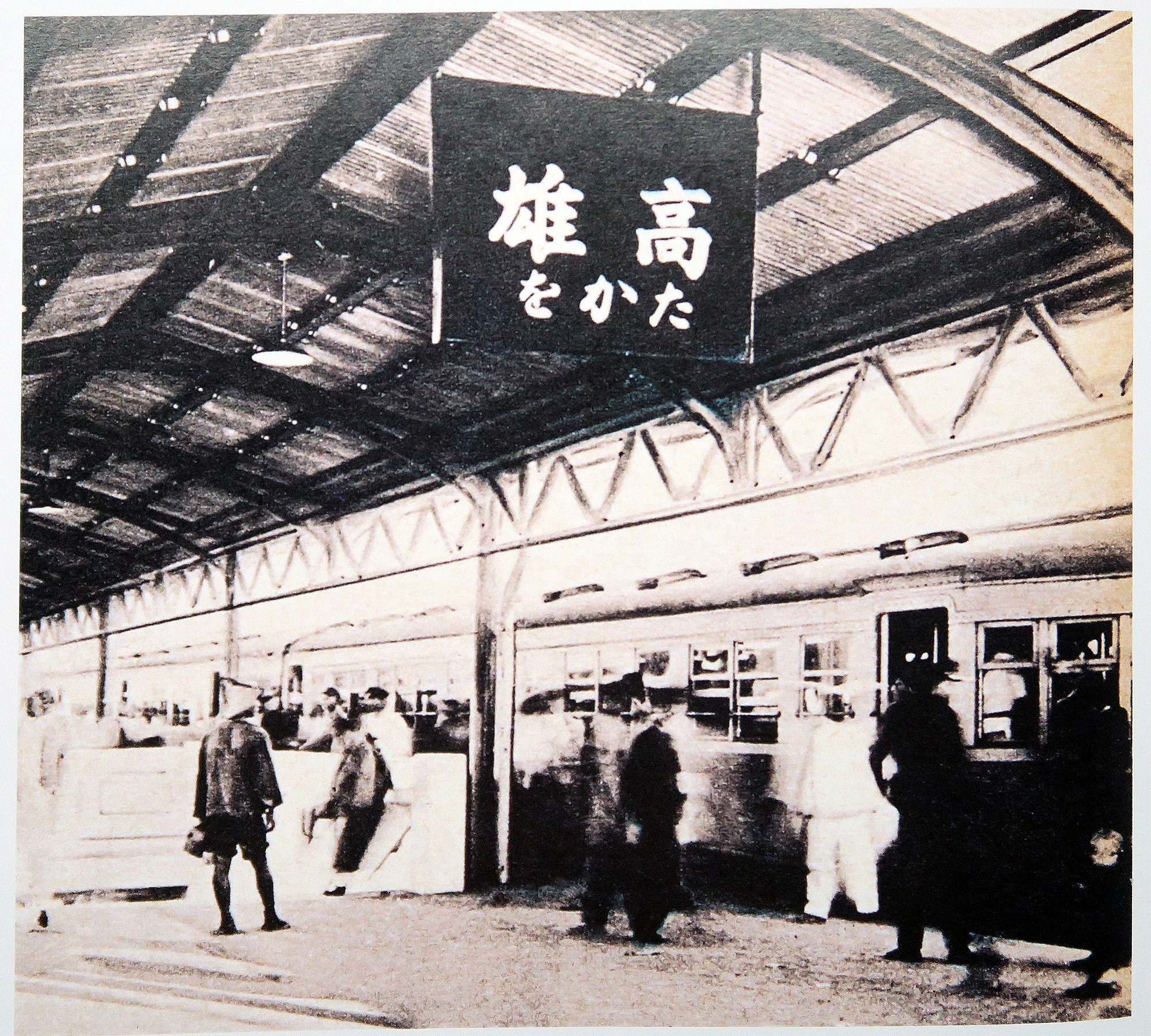 （新）高雄驛（高雄車站，1941年落成）內之景象。